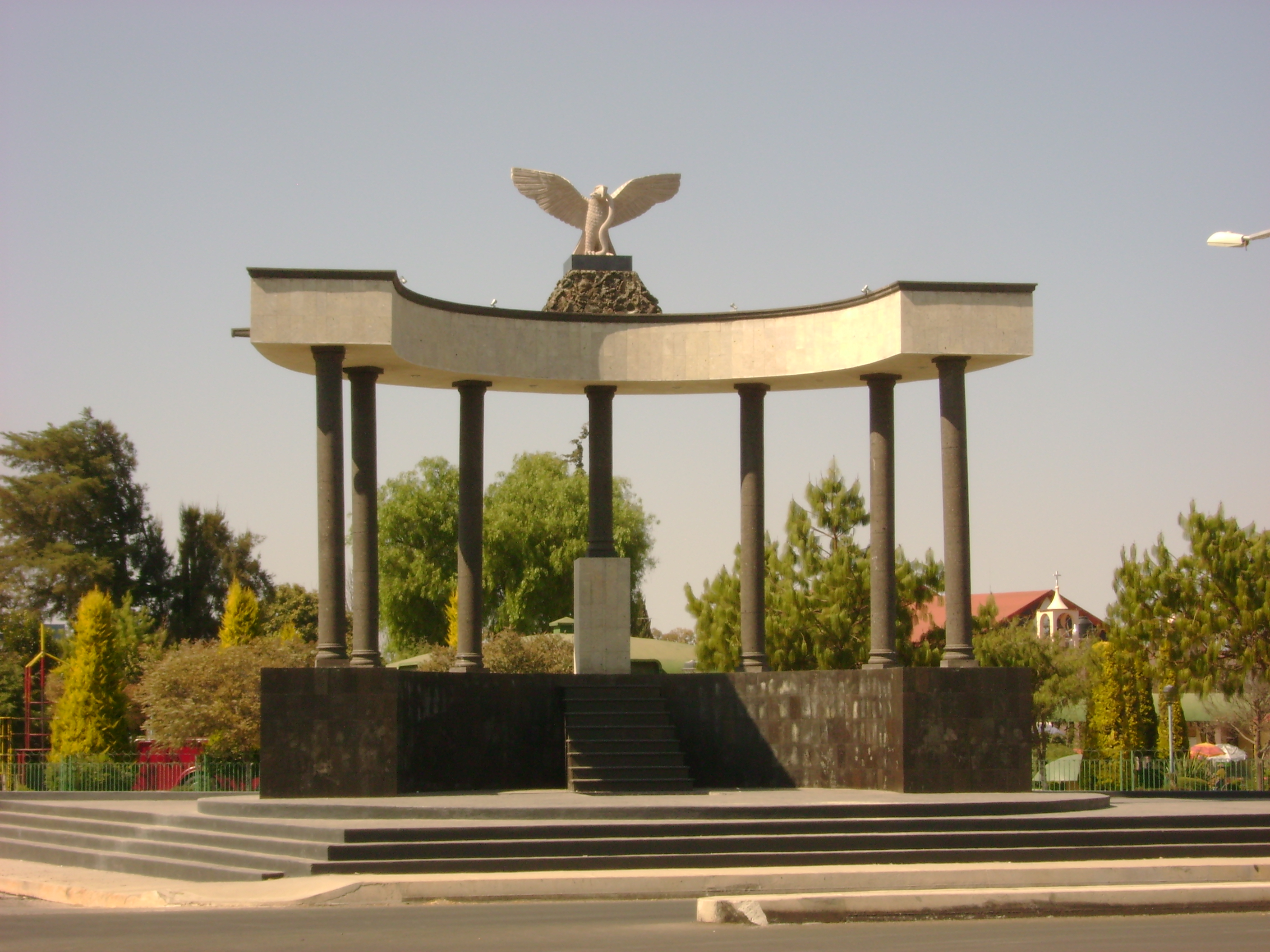 Fotografía del Hemiciclo del Bicentenario, monumento que se construyó para conmemorar el Bicentenario de la Independencia de México, esta hecho de cantera y se encuentra a un costado del Paseo Bicentenario, en Tulancingo, Hgo.